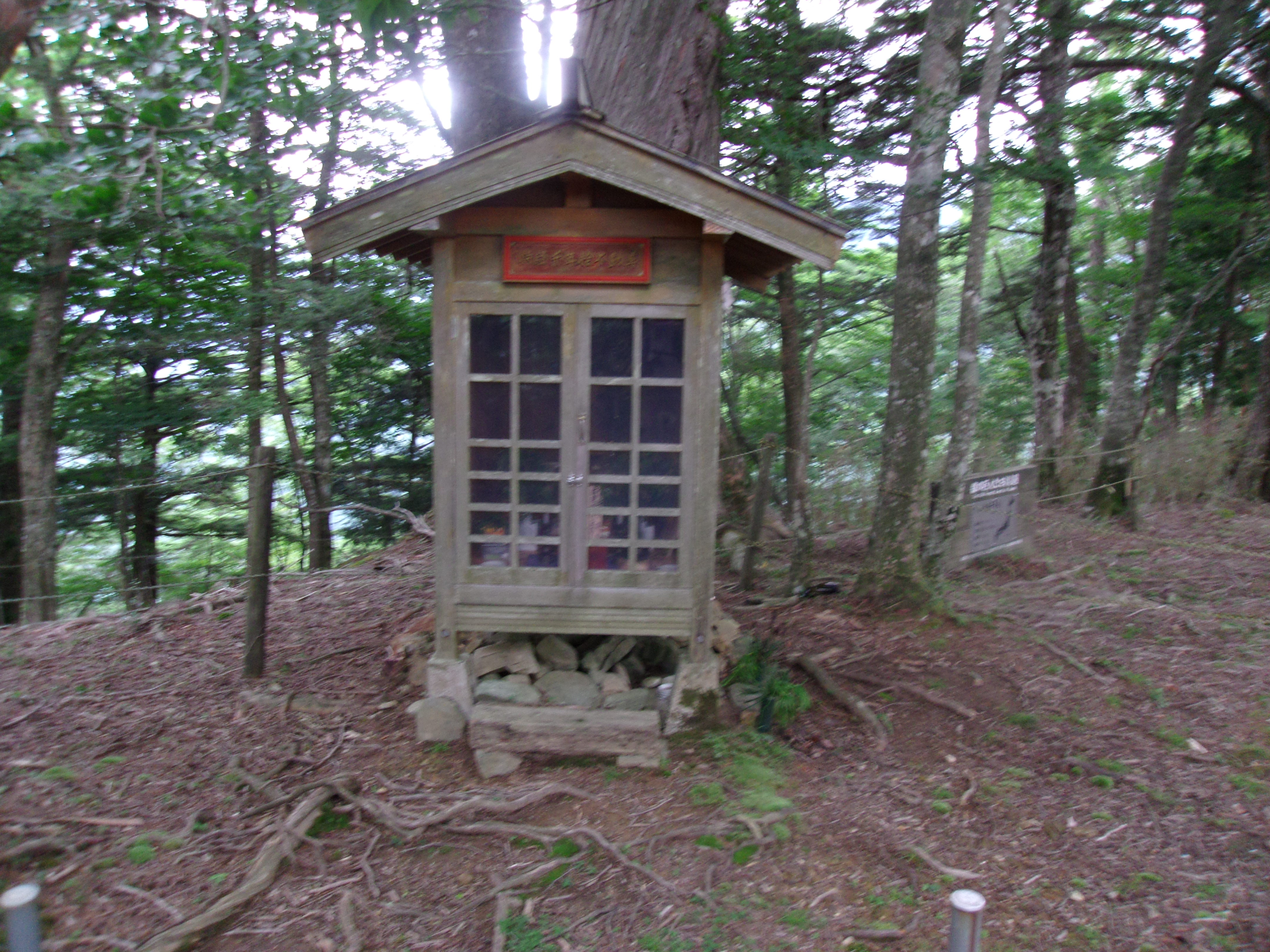 大峯奥駈道第22靡「持経宿」の持経千年桧不動尊